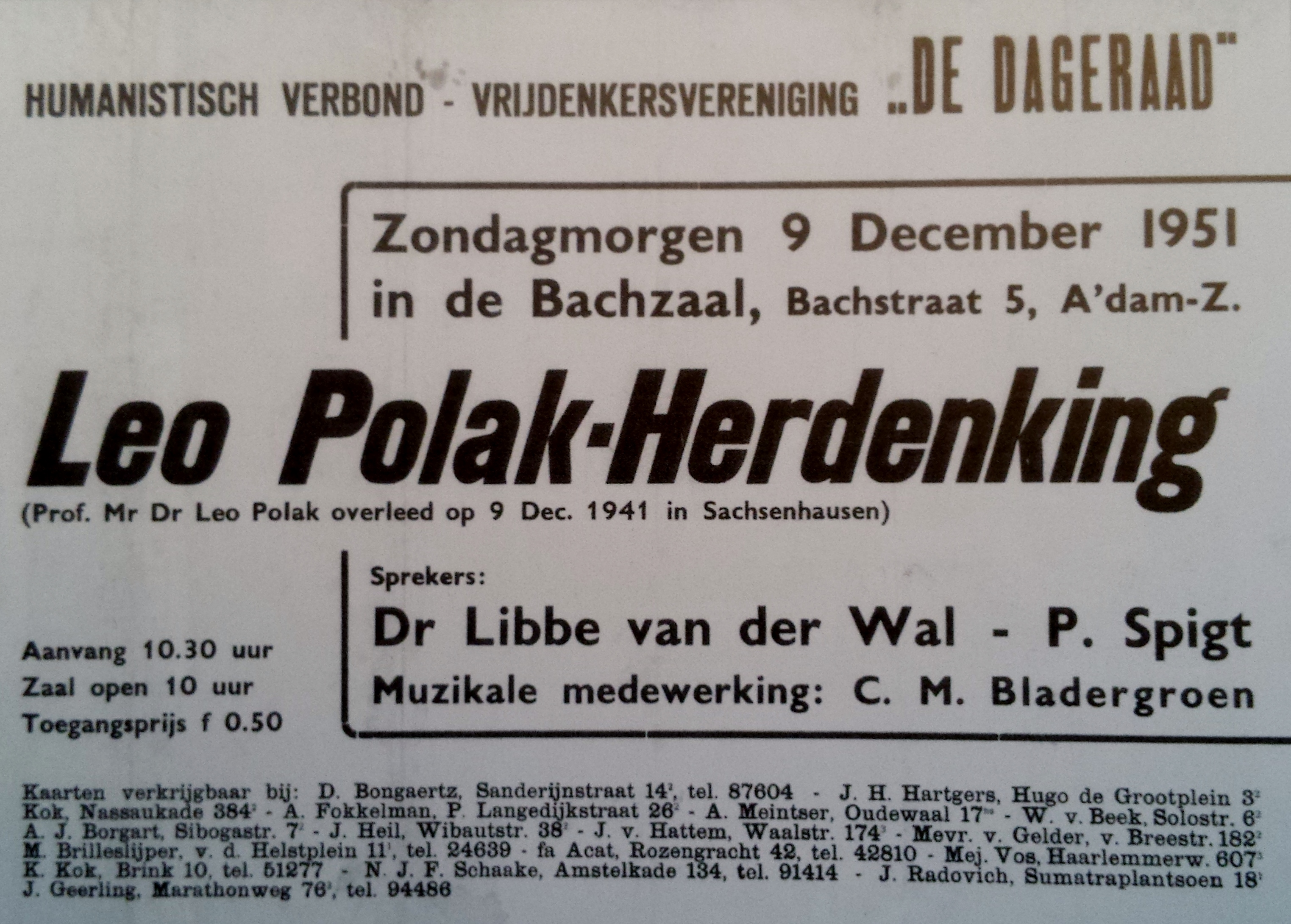 Affiche voor de Leo Polak-herdenking in 1951, die samen door De Dageraad en het Humanistisch Verbond werd georganiseerd.